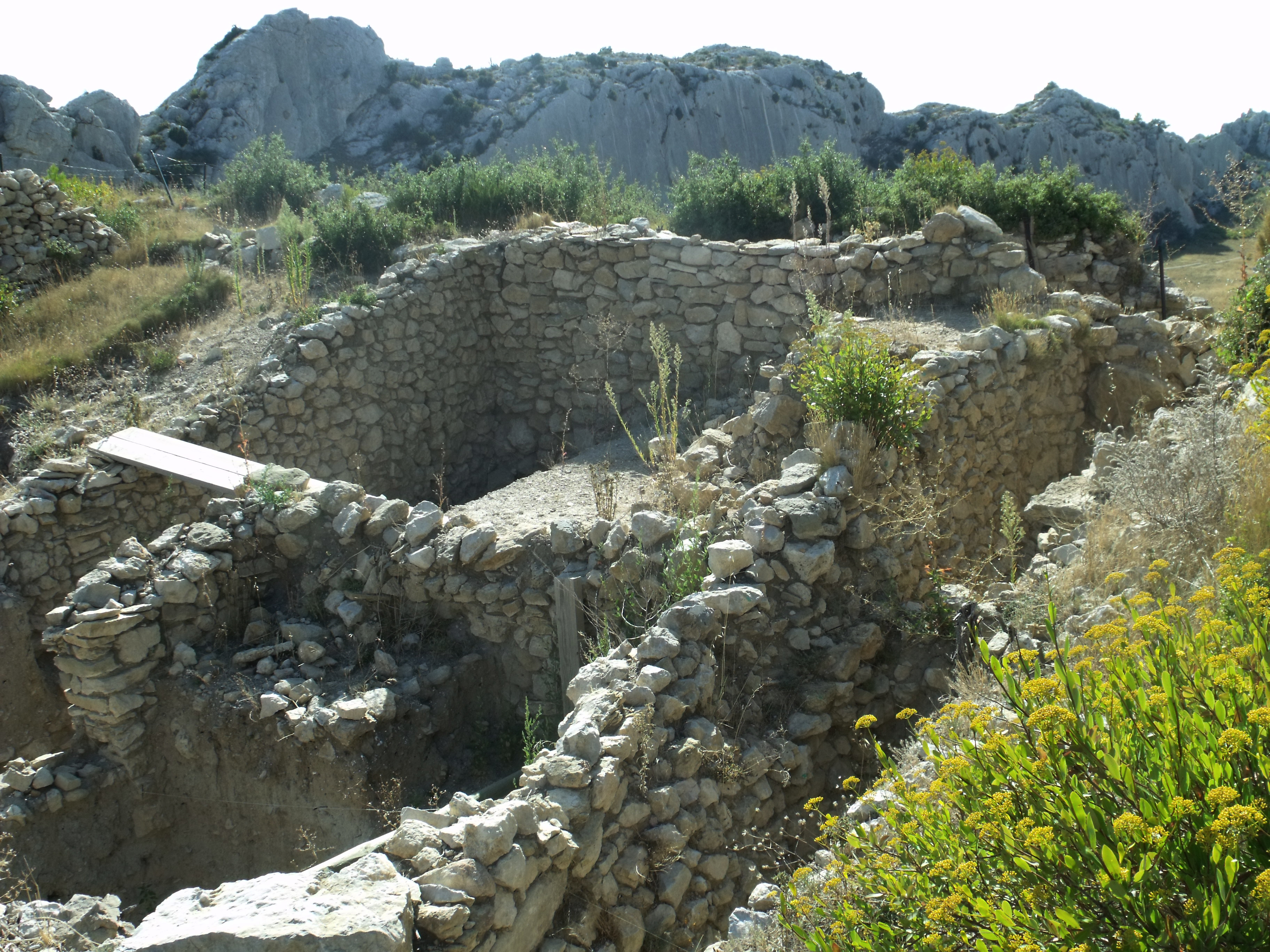 Maisons, Caisses de Jean-Jean. Mouriès, France.